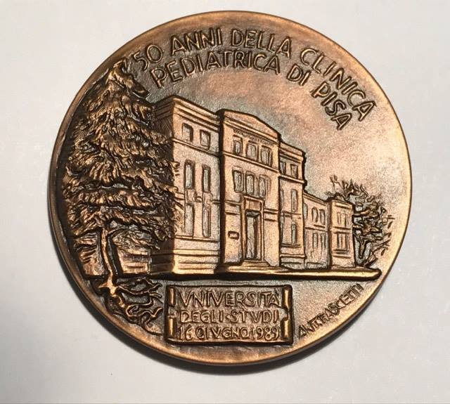 Medaglia dell'anniversario dei 50 anni dalla costruzione della Clinica Pediatrica di Pisa